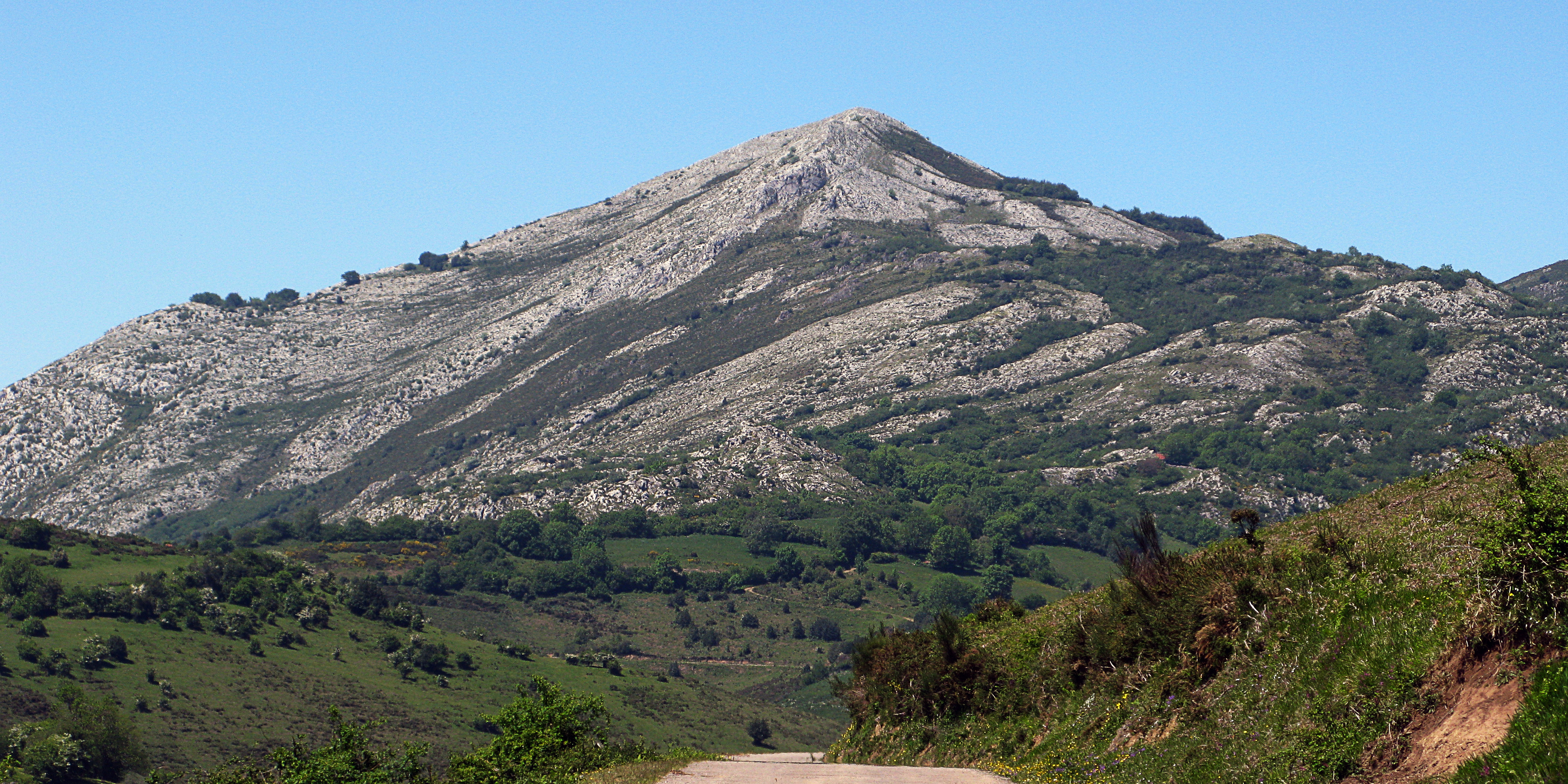 Los Puertos de Marabio se encuentran entre los concejos de Yernes y Tameza, Teverga y Proaza, y están delimitados al este por la sierra de Peña Padiella, al oeste por la Sierra de la Granda, al norte por el Pico Caldoveiro y al sur por la divisoria de aguas del río Santibáñez. El Pico Caldoveiro es una sierra interior que abarca 11.359 ha. Su máxima altura es el pico homónimo, con 1354 m., de fácil ascensión desde el pueblo de Villabre.